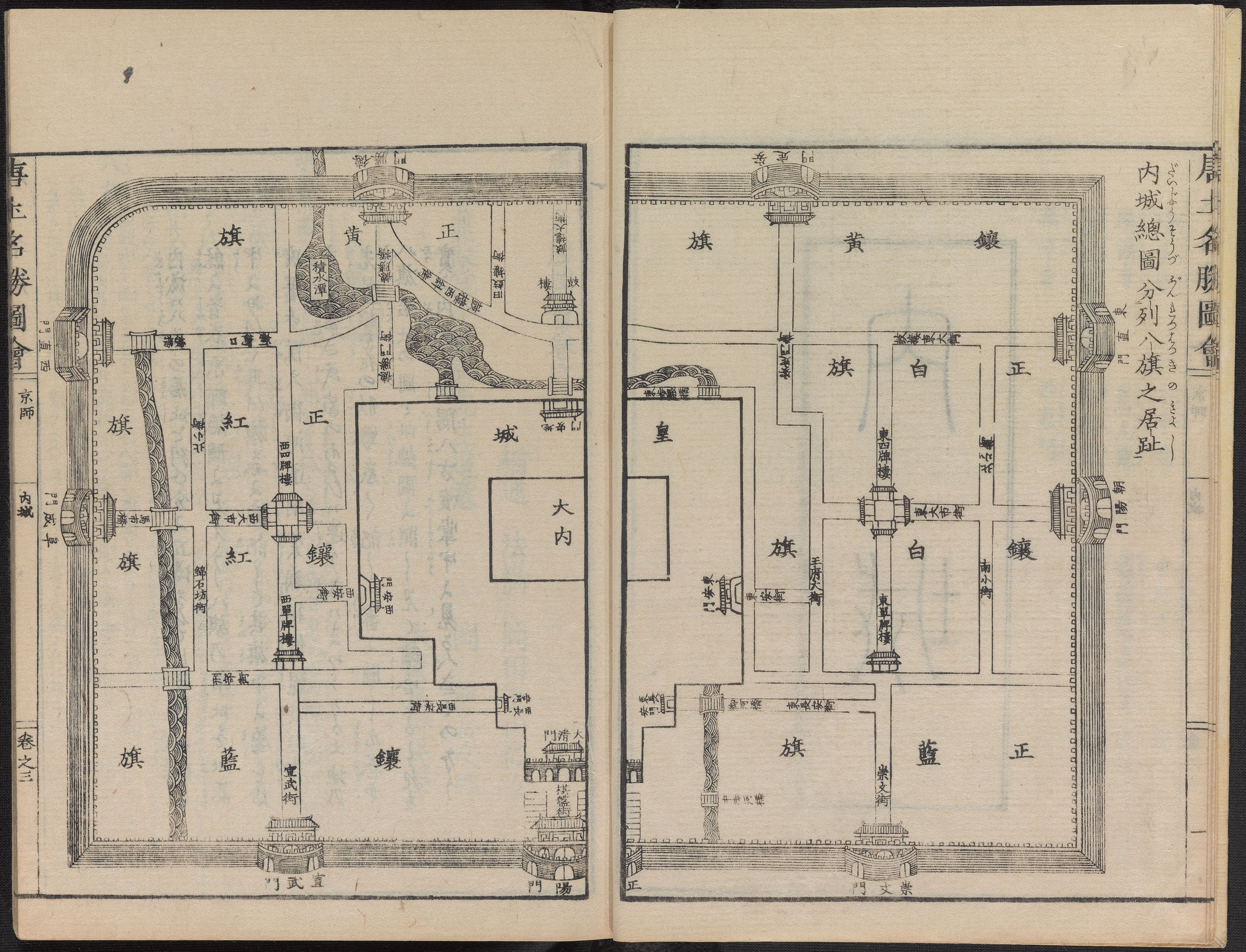 北京内城总图（分列八期之居趾），出自《唐土名胜图会》卷三